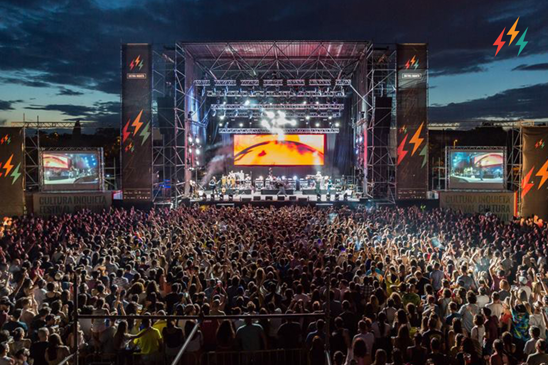 Concierto de Residente en el Festival Cultura Inquieta 2018